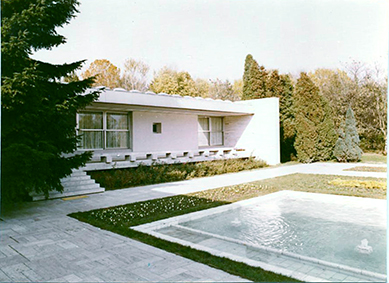 Villa présidentielle du couple Ceaușescu avec cinéma et piscine "LAC 2" à Bucarest Floreasca